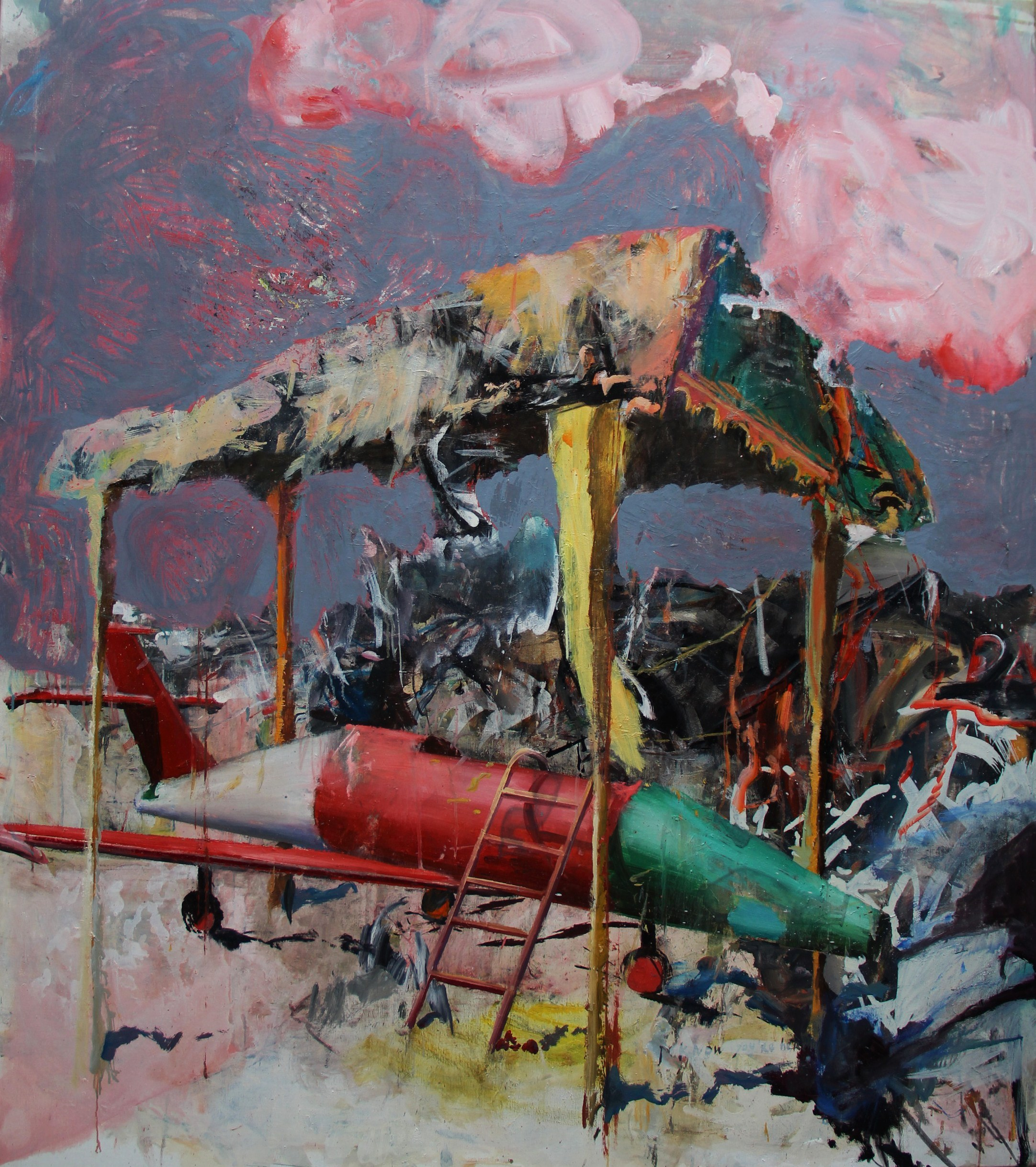 Художник Игорь Тишин. "Панама". Холст, масло, 170x150 cm